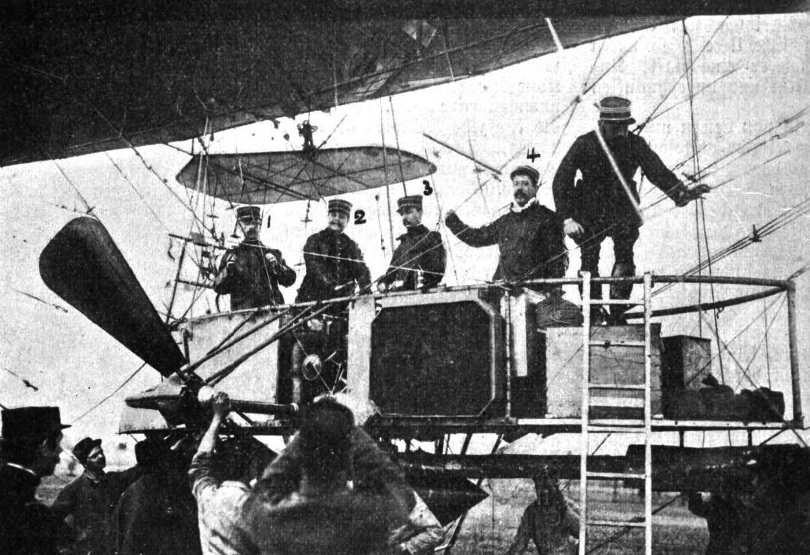 Das Luftschiff La République stürzte am 25. September 1909 in Trévol ab. Die bei der Katastrophe verunglückten vier Offizier vor dem letzten Aufstieg waren. 1. Kapitän Marchal, 2. Leutnant Chaure, 3. Adjuamt Vincenot, 4. Adjudant Reaux.